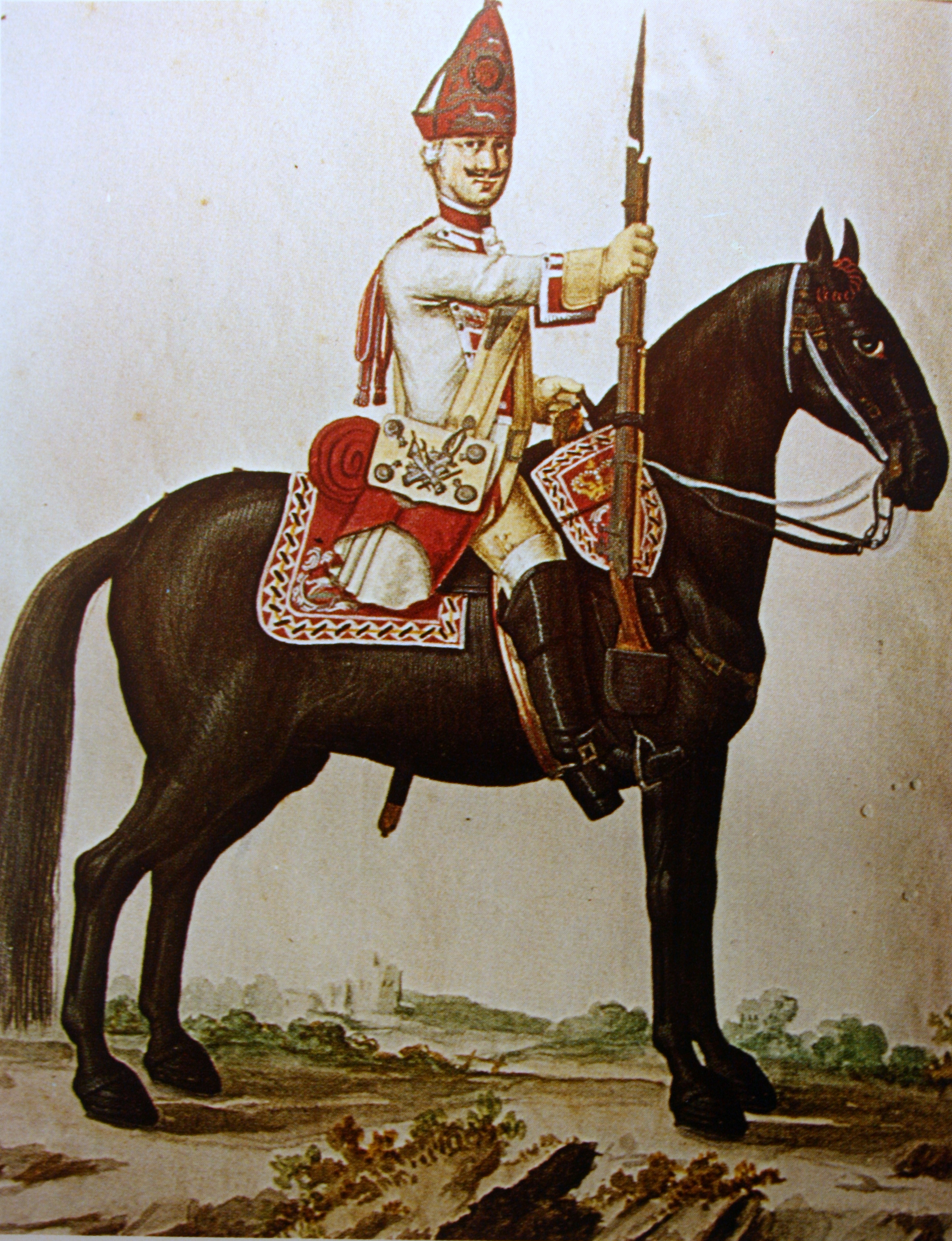 Kurhannoversches_Dragonerregiment_D_I Grenadier